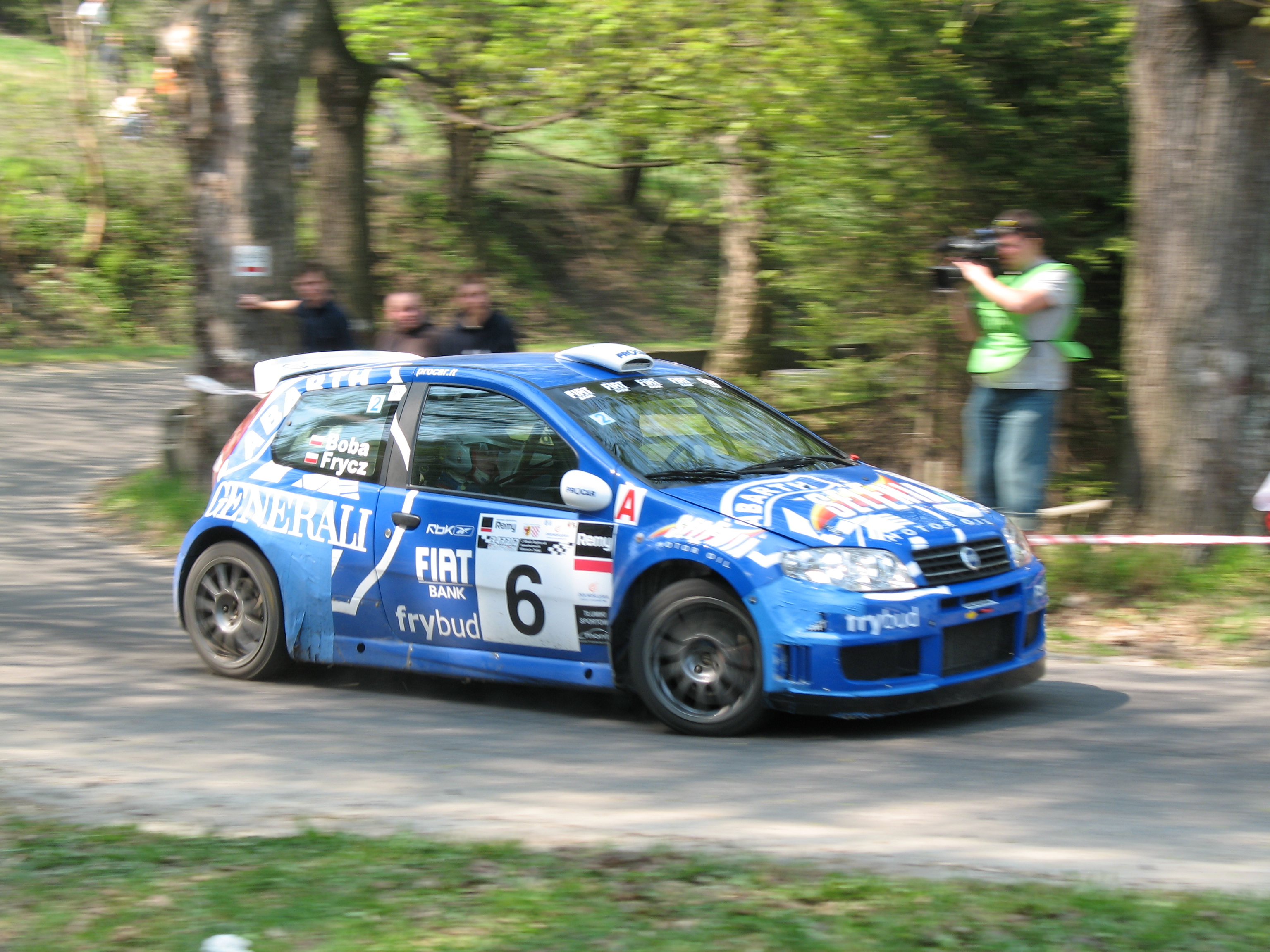 Sebastian Frycz na OSie w Kamionkach (2006).